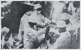 윤치왕 교수의 제왕절개 시술 장면 (1934년)